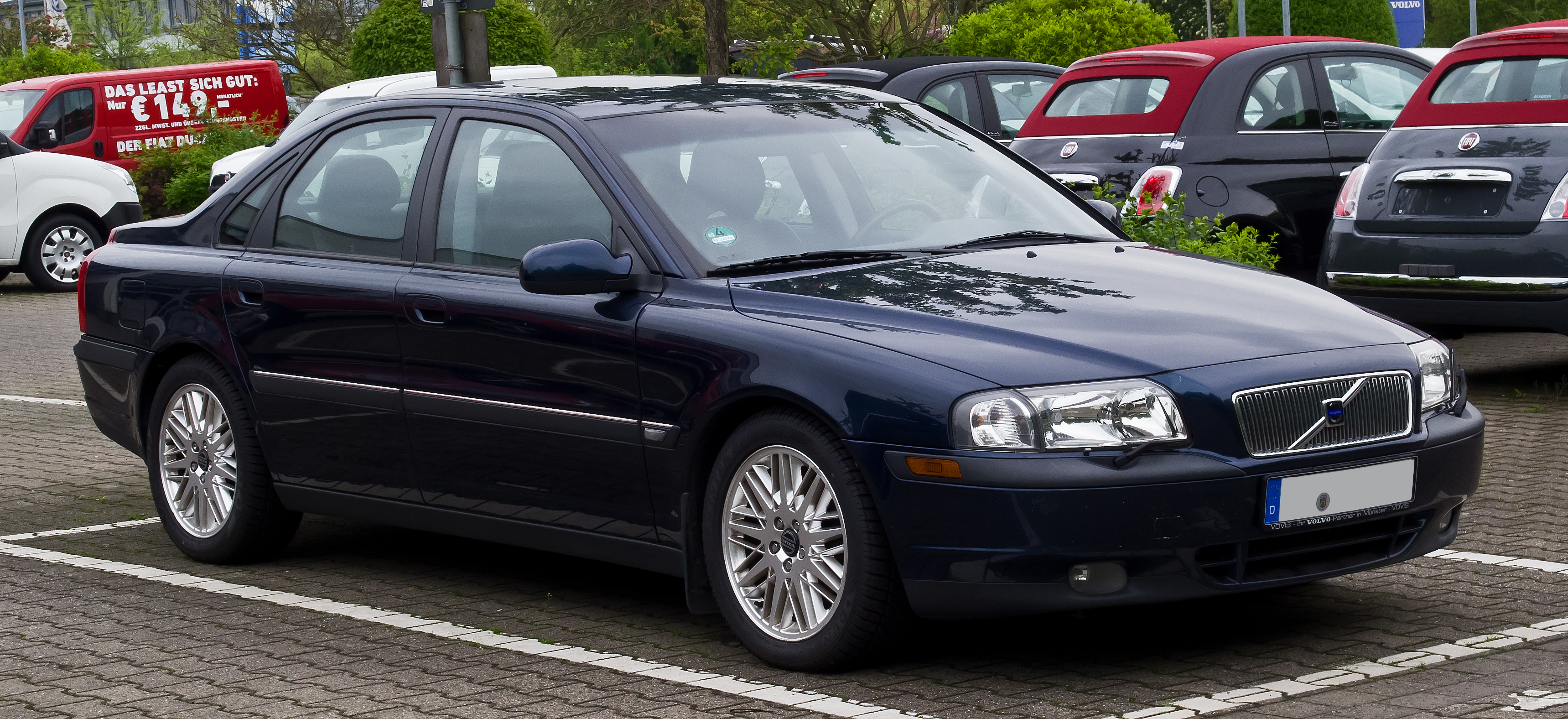 Volvo S80 (I)